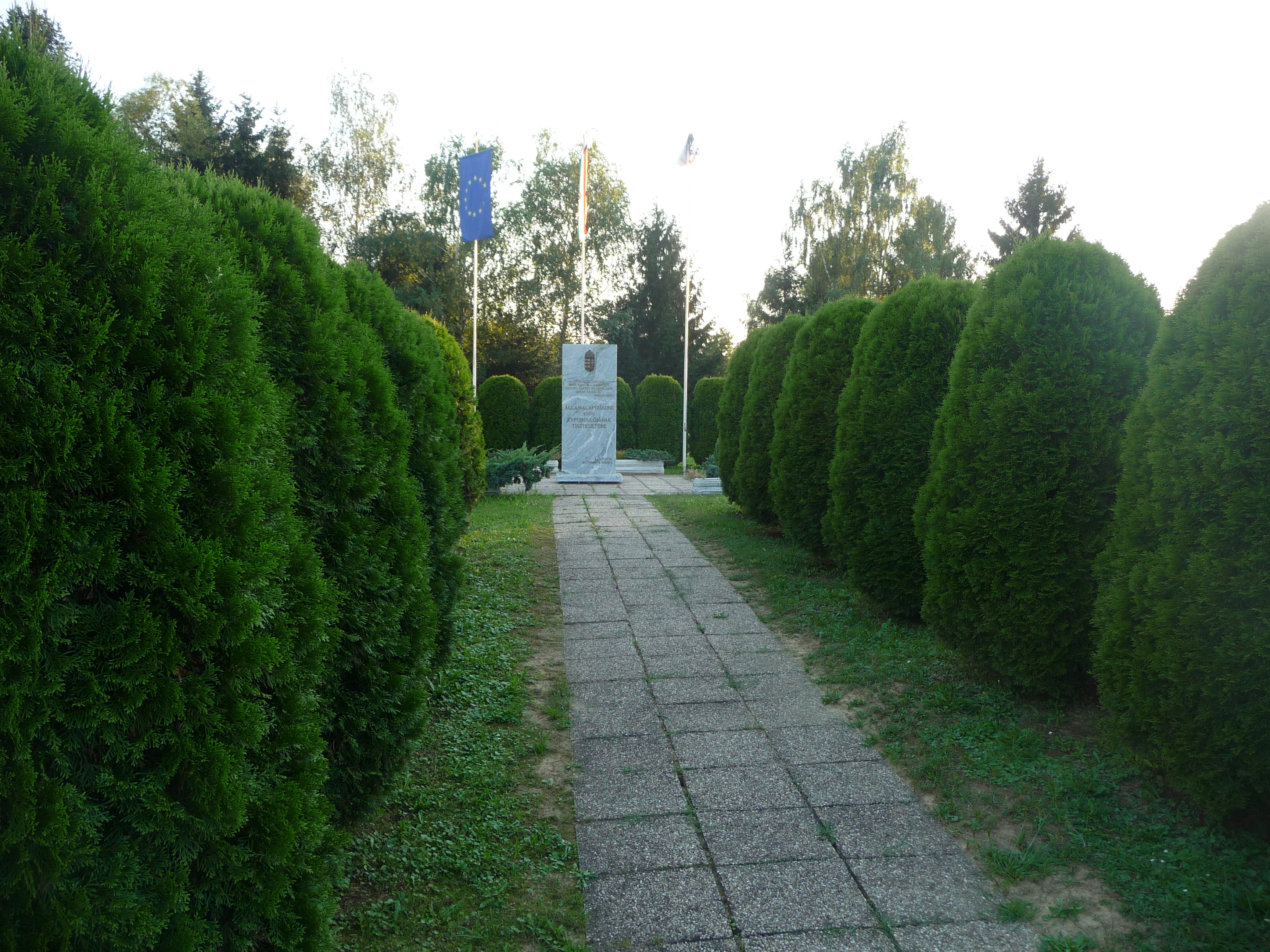 Millenniumi Emlékpark, Bajánsenye